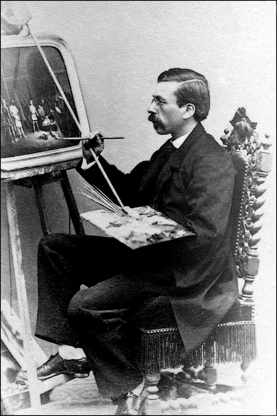 El artista dibuja un cuadro